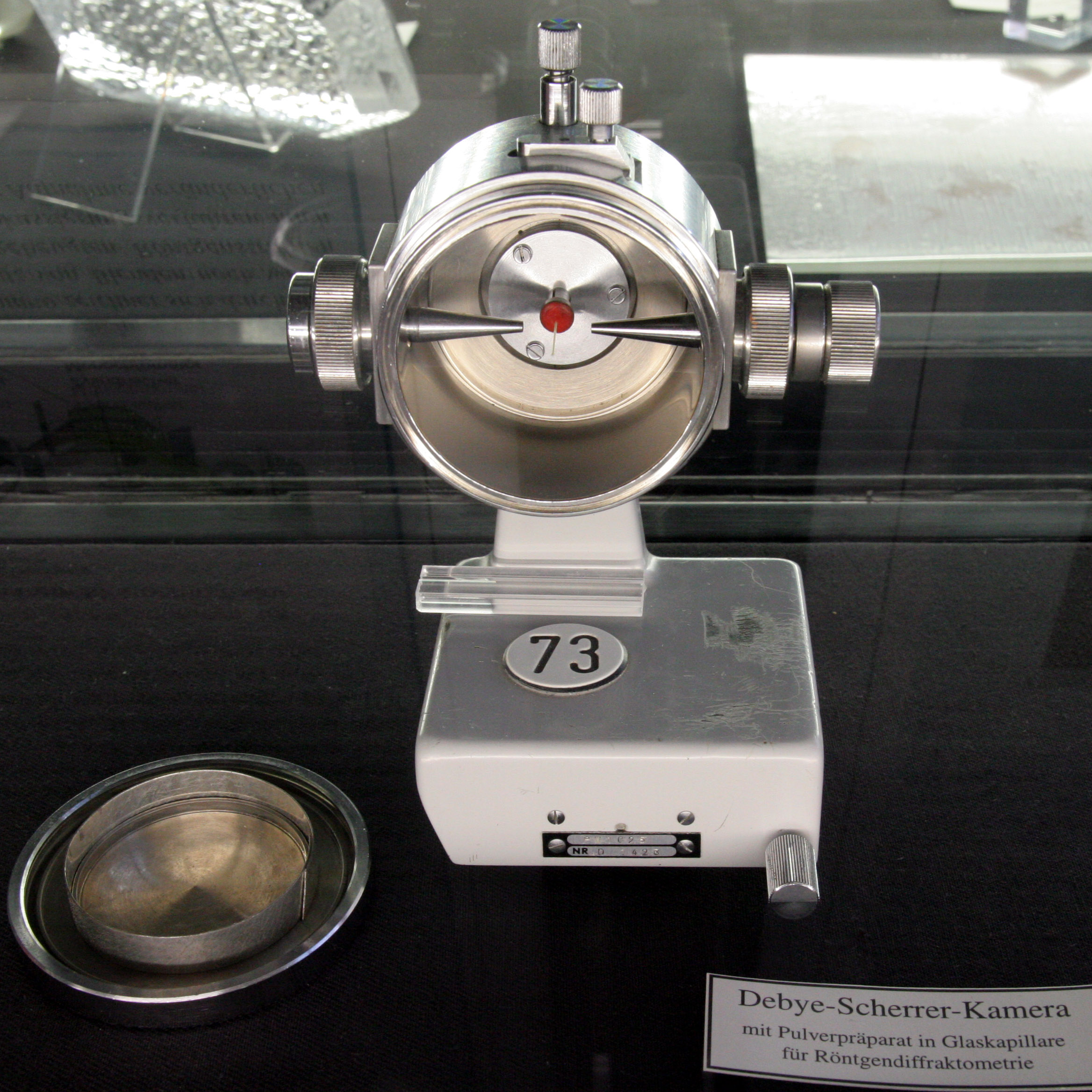 Debye-Scherrer-Kamera zur Pulverdiffraktometrie. Das Gerät befindet sich im Museum des Institutes für Geowissenschaften an der Ruprecht-Karls-Universität in Heidelberg (Im Neuenheimer Feld 234) [1]